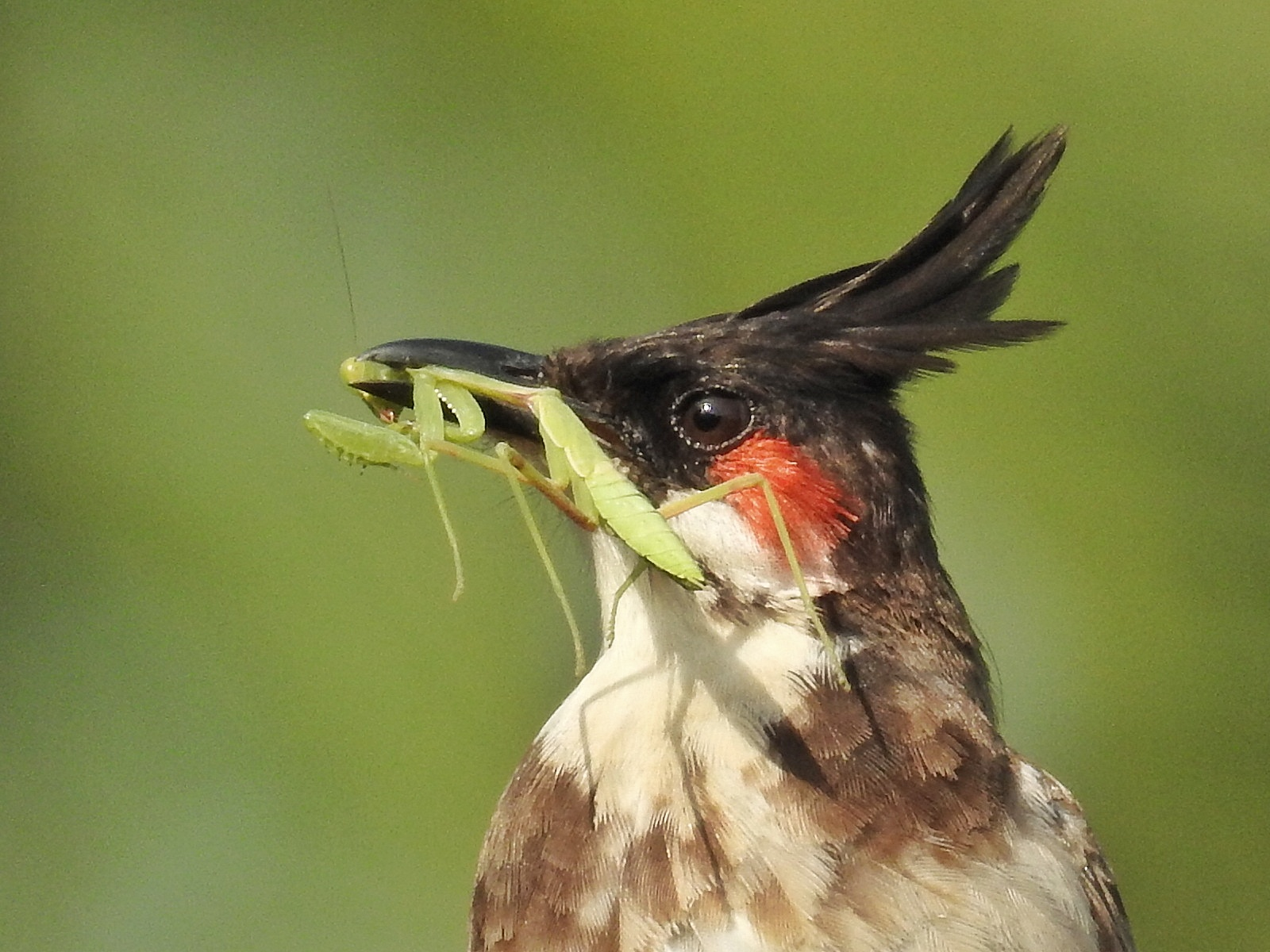 From kannur keeriyad